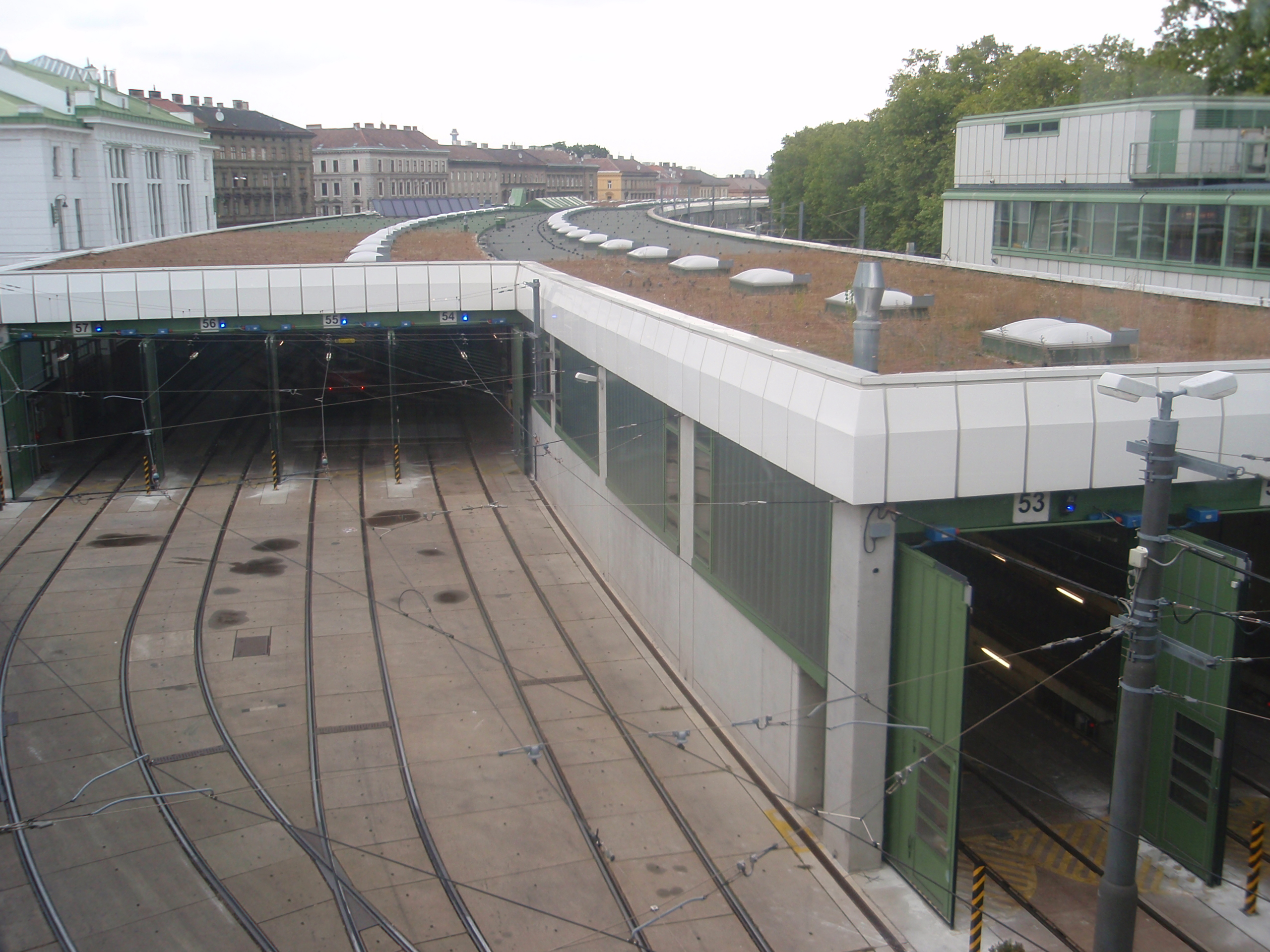 U6-Betriebsbahnhof Michelbeuern